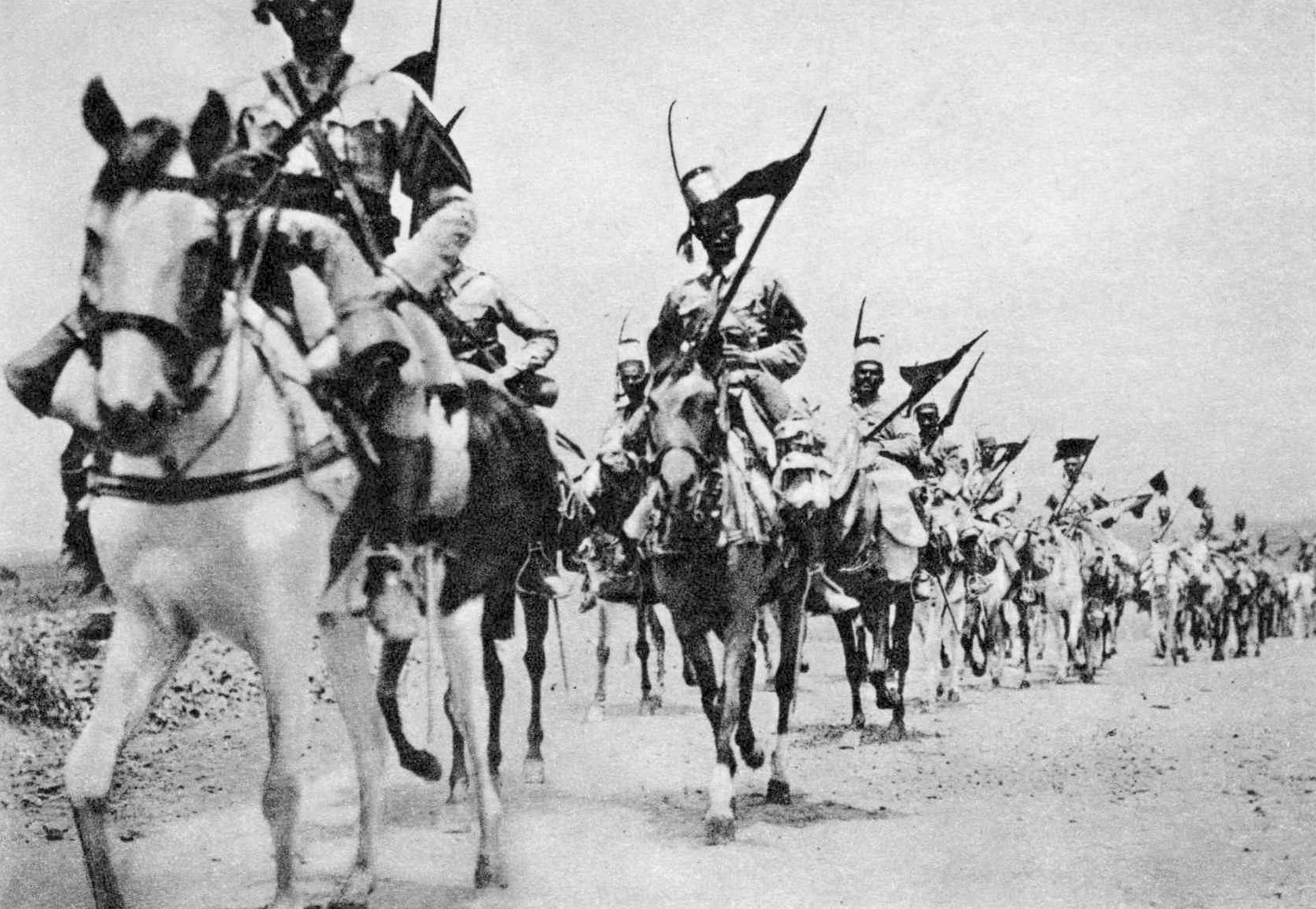 Serie:Visioni della conquista dell’Impero – Cavalleria indigena italiana verso Addis Abeba